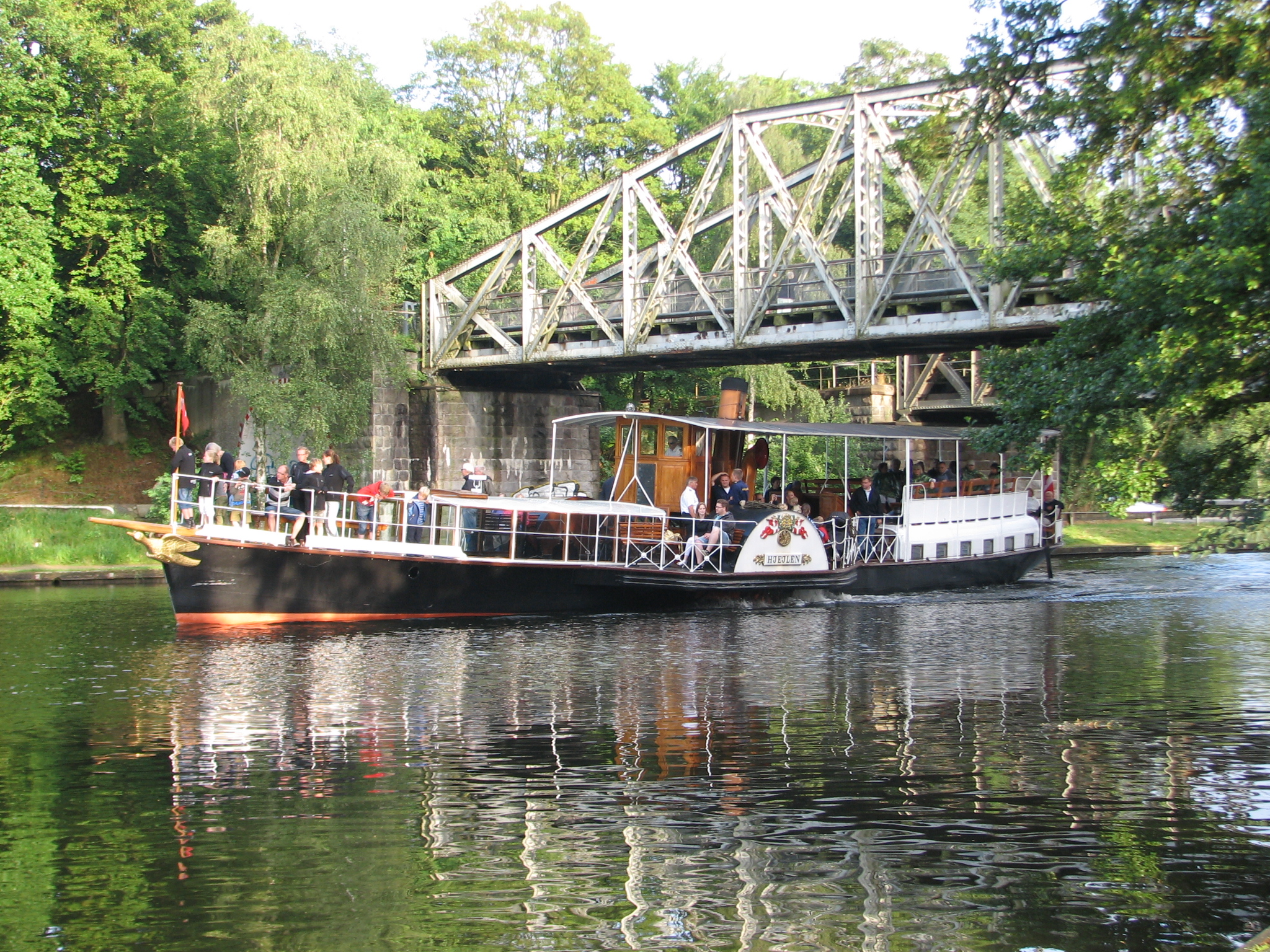 S/S Hjejlen